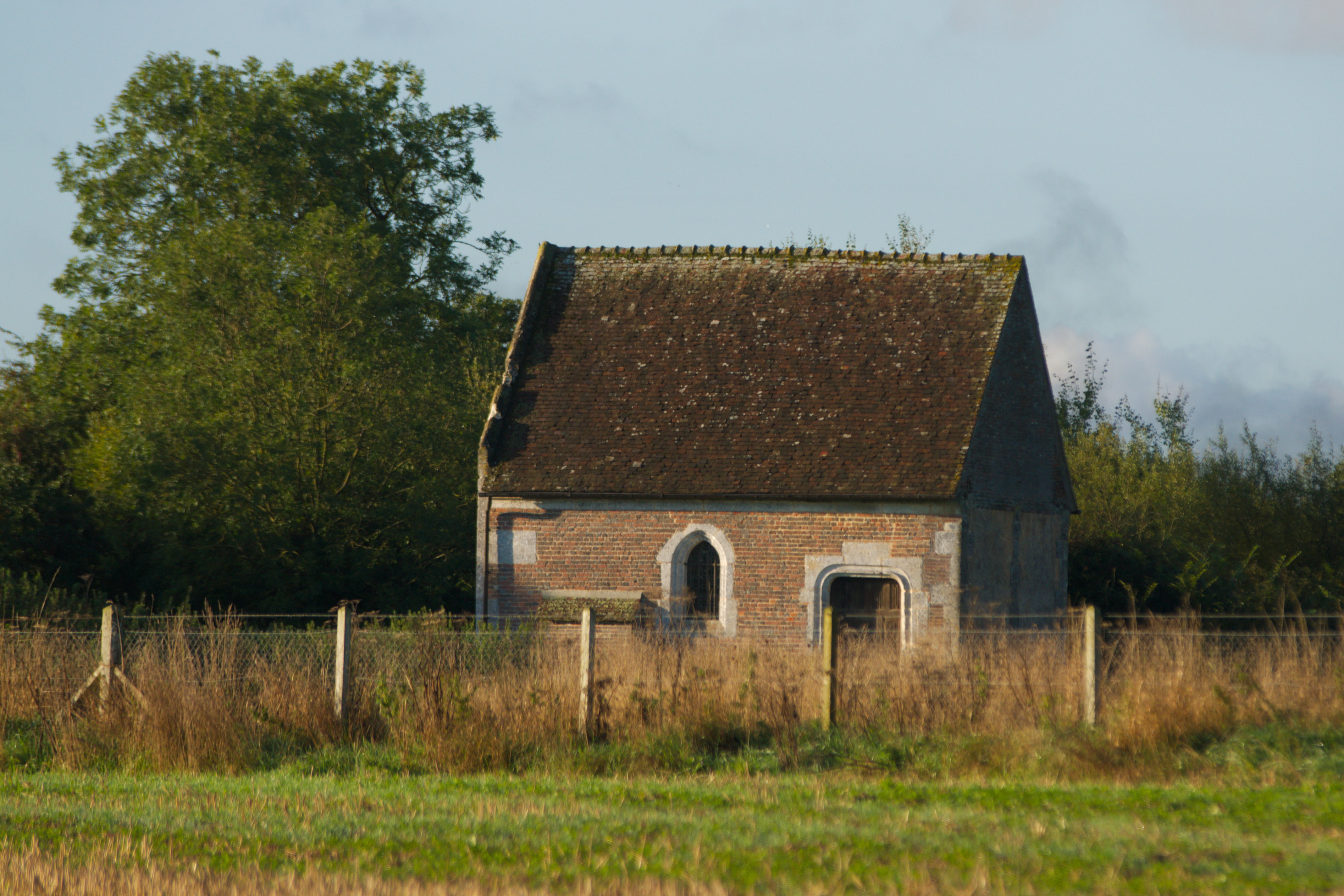 Chapelle des minières, commune de Beaubray, Eure.